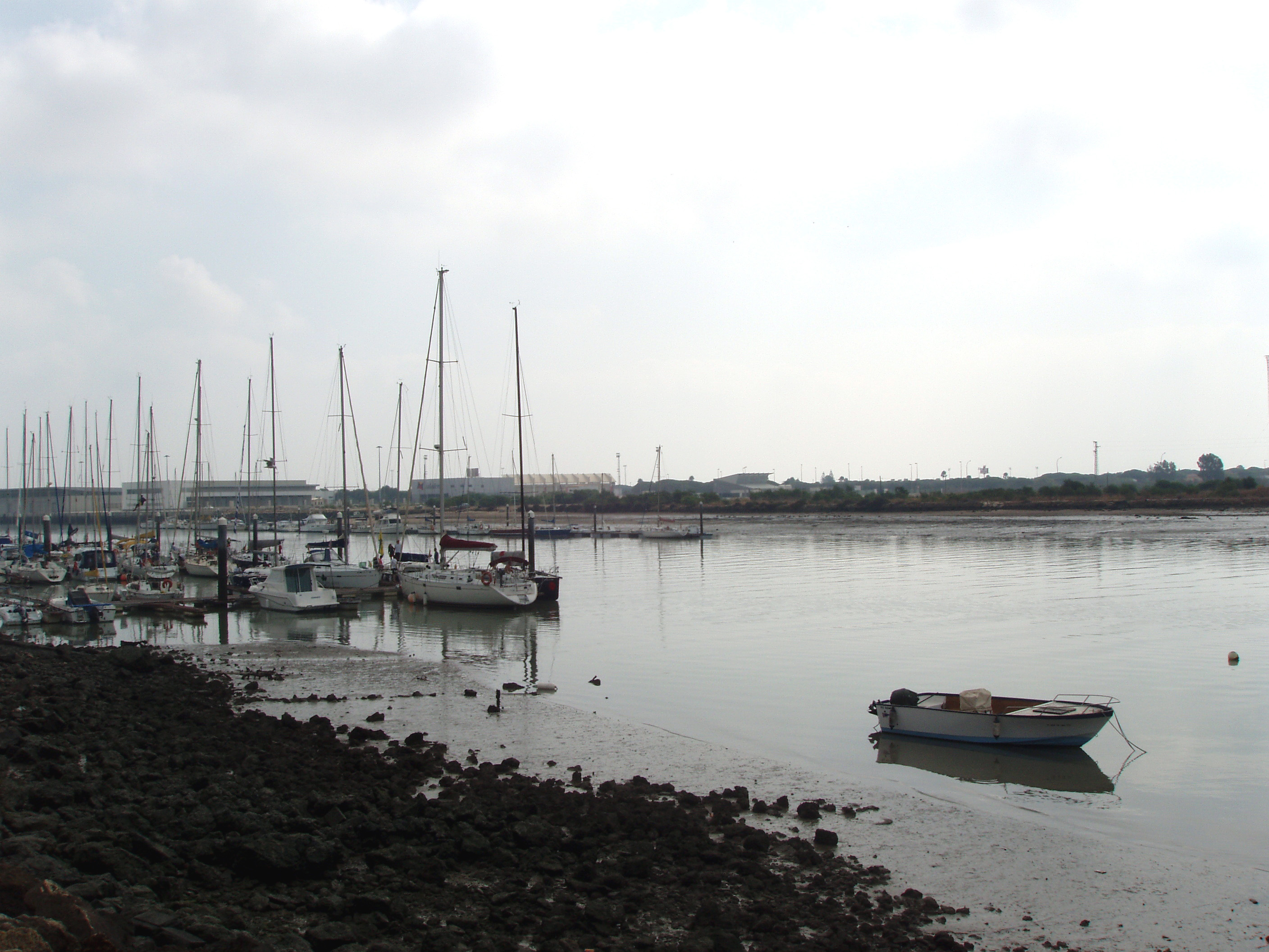 desembocadura del río Guadalete, en El Puerto de Santa María (Cádiz).